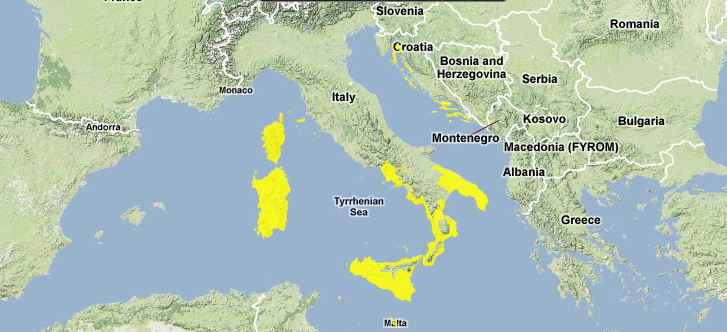 Mappa Ecoregione PA1222 - Foreste sclerofille e miste tirreno-adriatiche